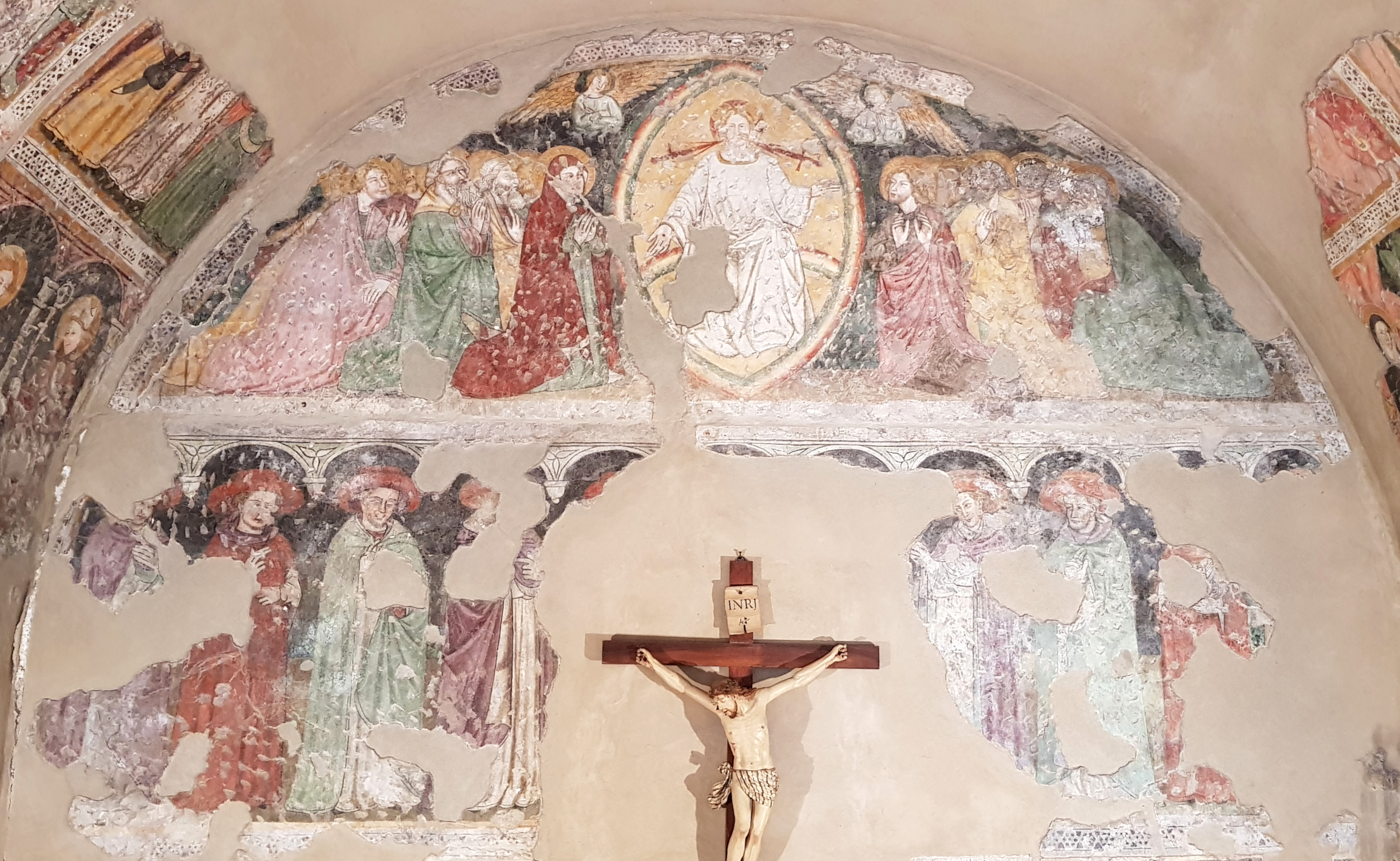 Chiesa di Ognissanti di Ospedaletto - Secondo strato di affreschi. Lunetta di fondo. Cristo Apocalittico. Secolo XV